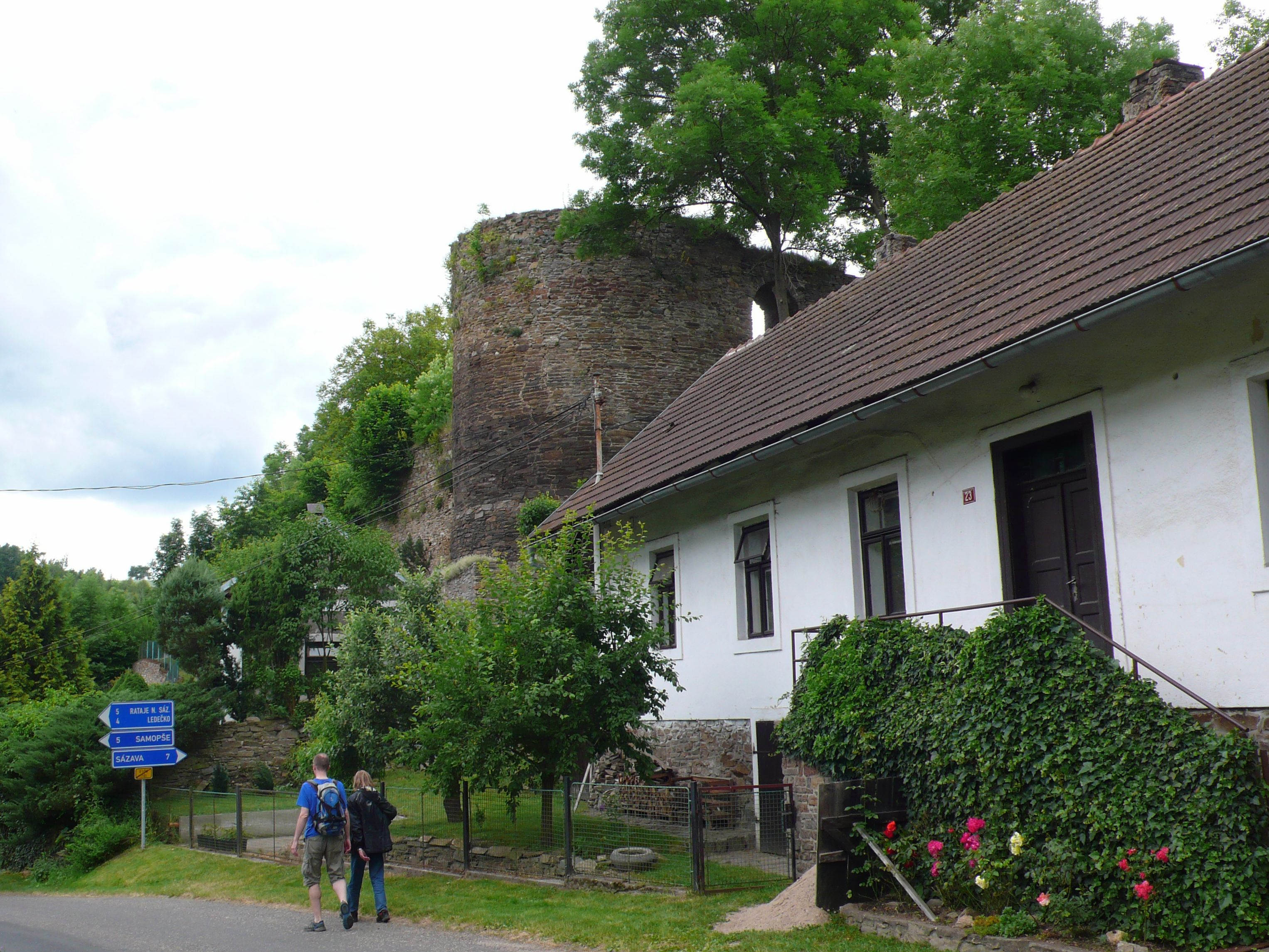 Celkový pohled na jádro hradu s bergfritem v popředí od severovýchodu